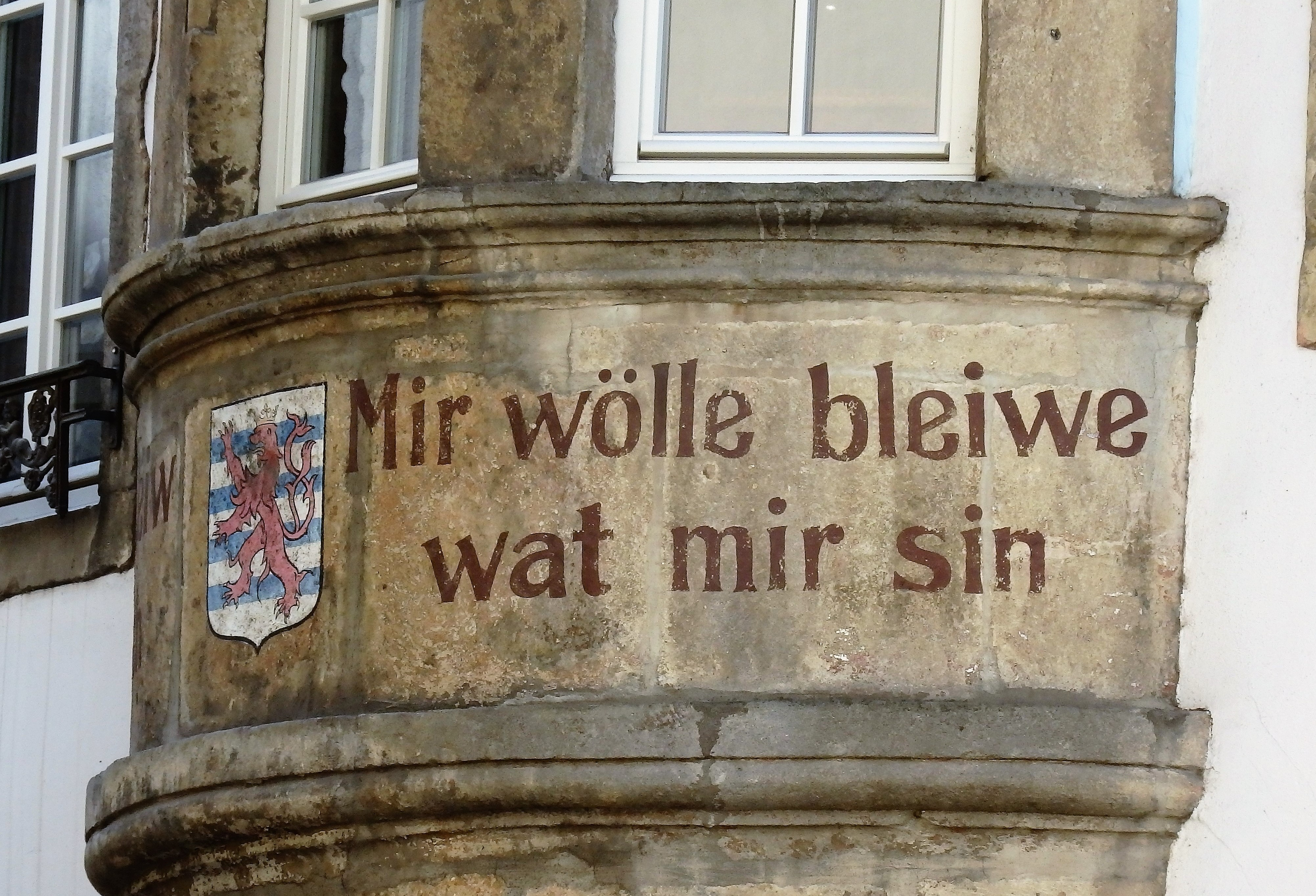 Fassadendetail an Luxemburger Altstadthaus